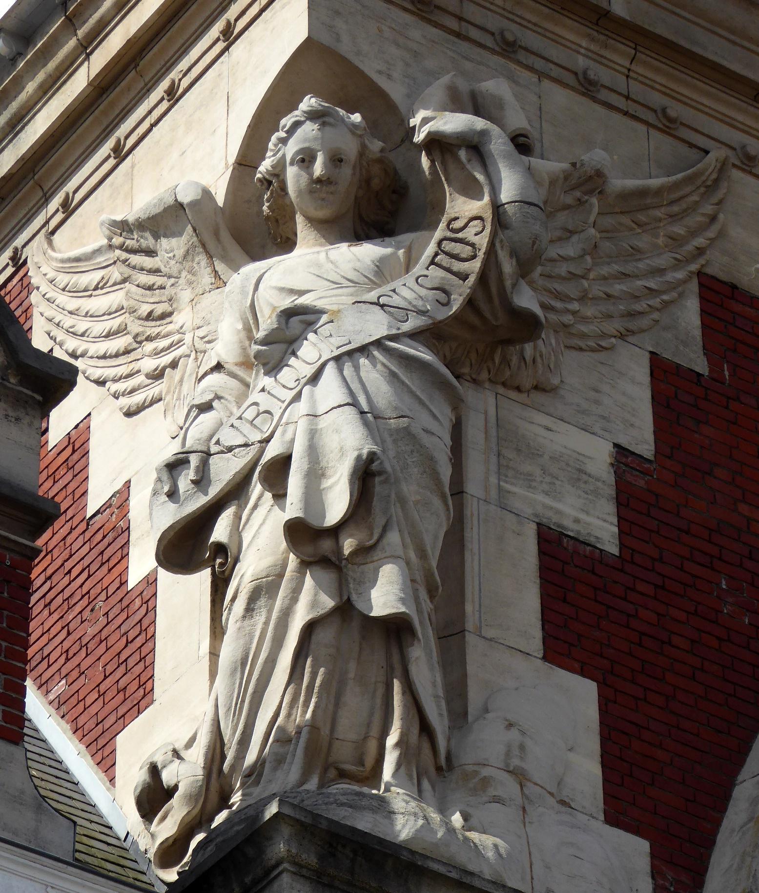 ICAM de Lille Statue Ubique Custos